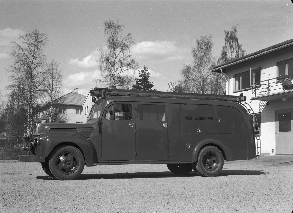 Ford V8 1946-47 med påbygg fra Fjeldhus Bruk, fortografert ved Kastellet brannstasjon 1950